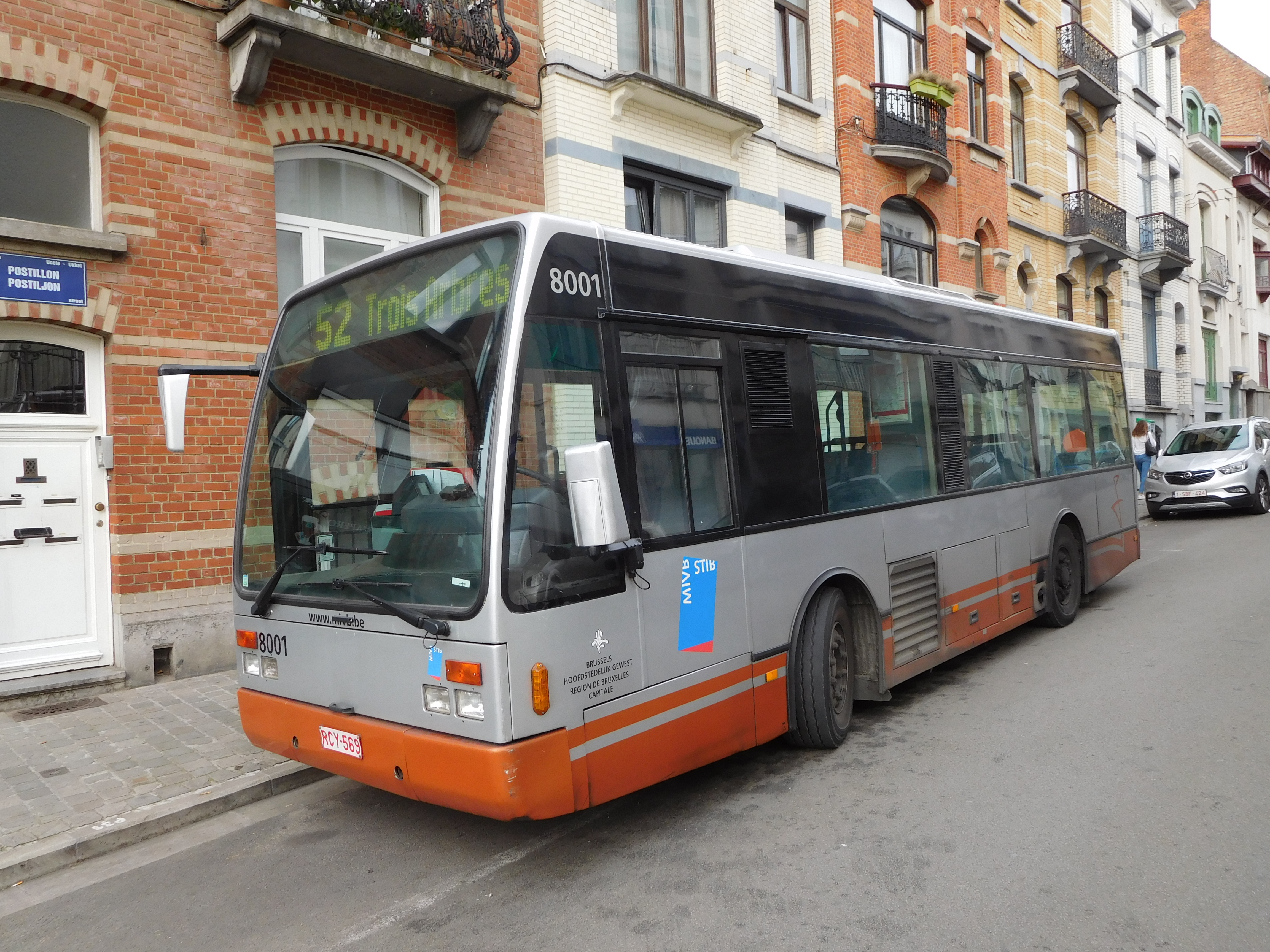 autobus 8001 sur une navette de remplacement square Marlow